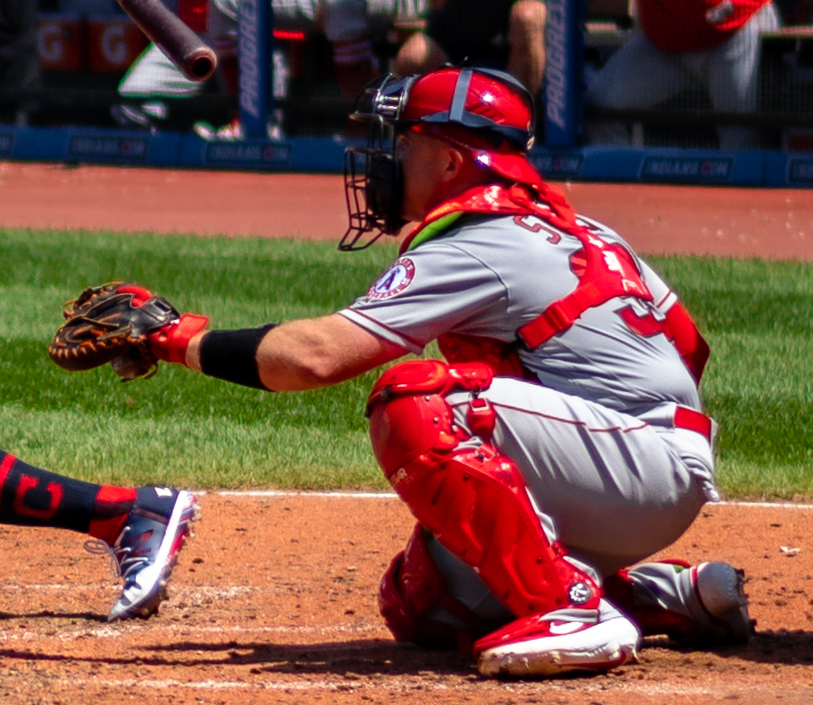 Los Angeles Angels VS. Cleveland Indians